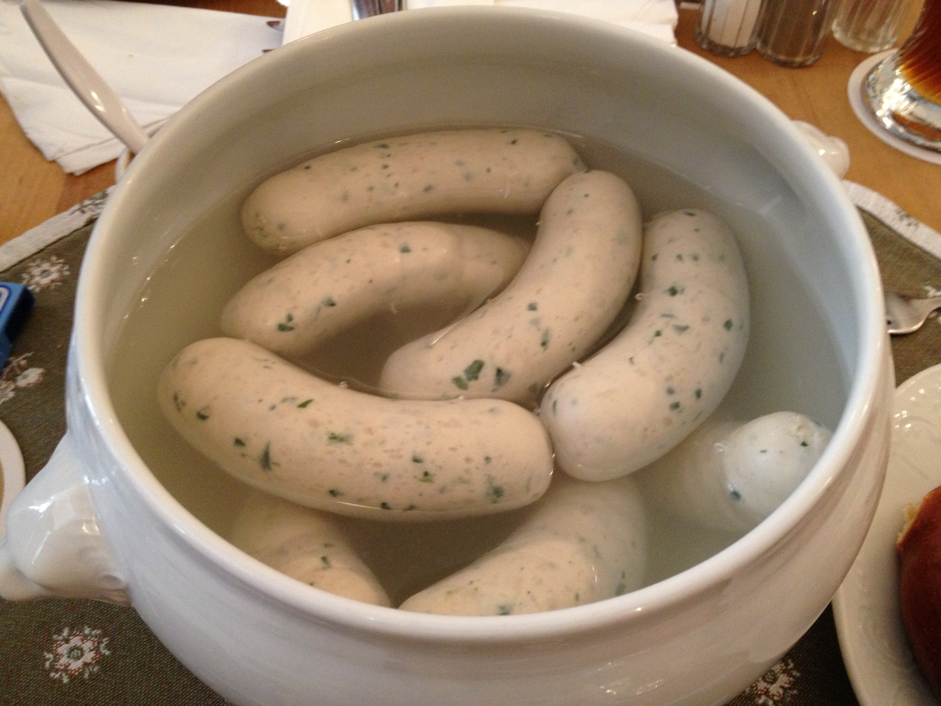 Bayerische Weißwürste